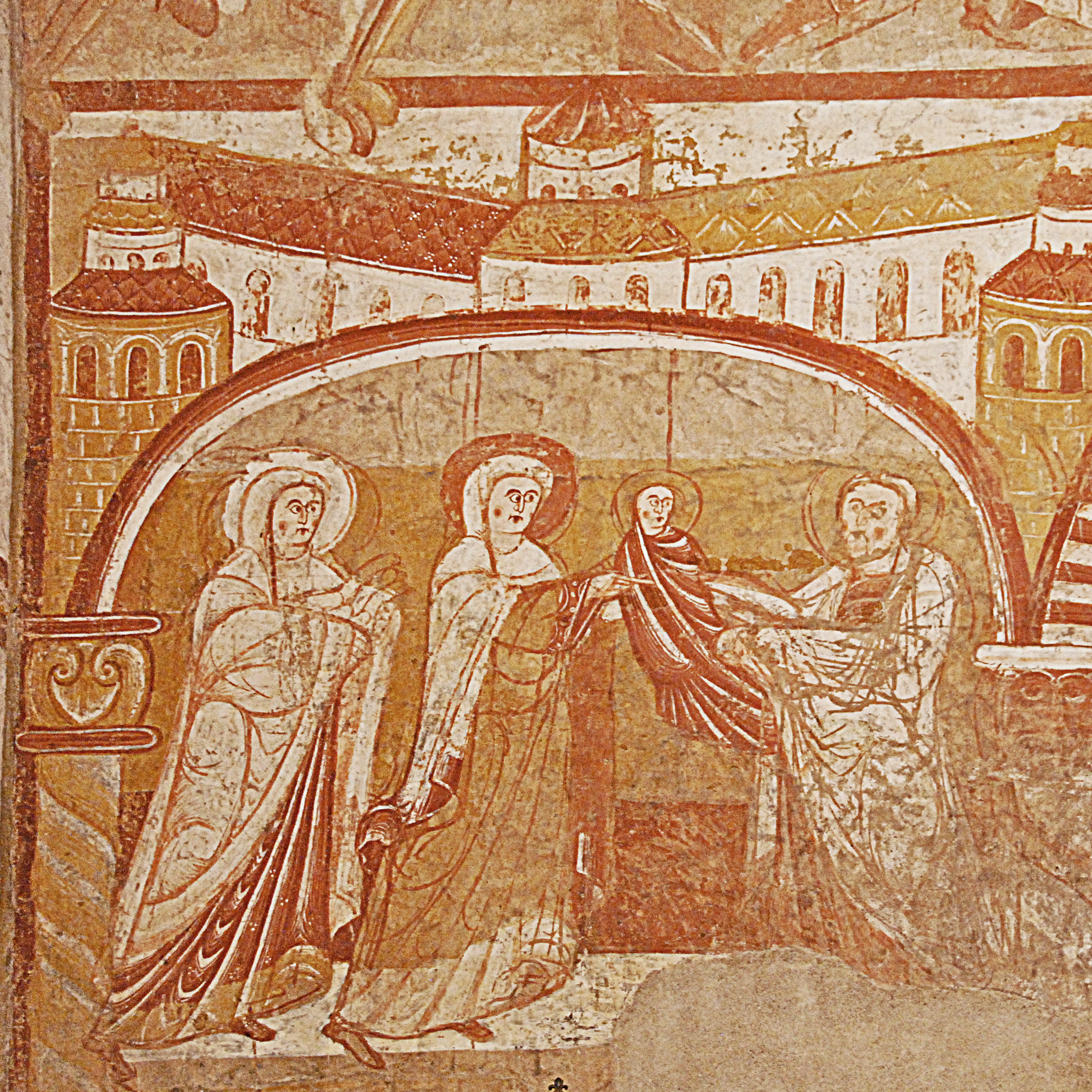 Schiff, Ostwand, Darstellungb Jesu im Tempel